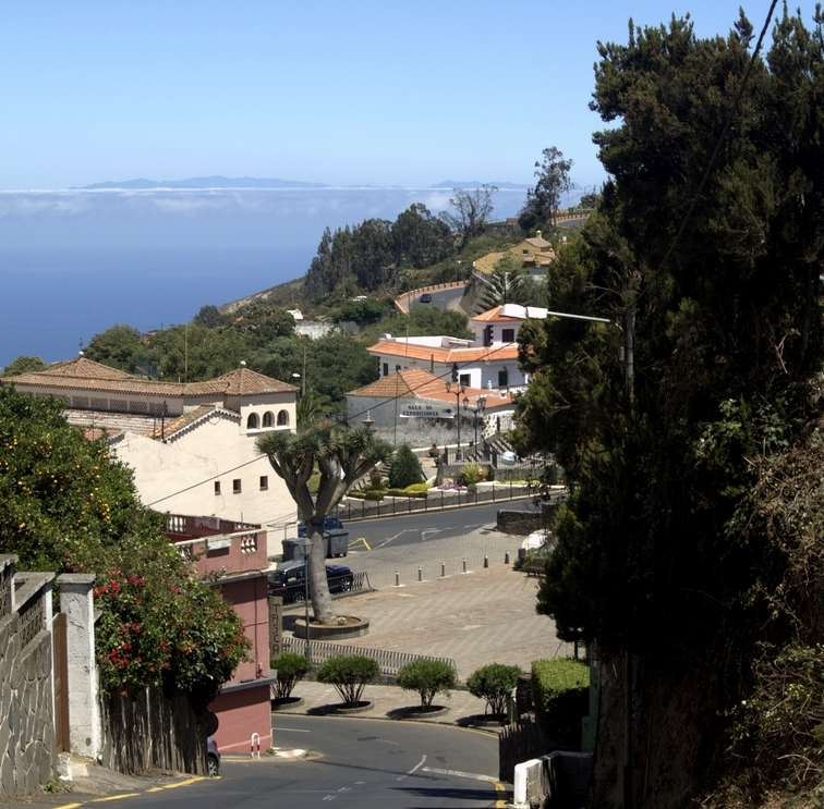 Vista de La Esperanza. Zona del Bosque del Adelantado